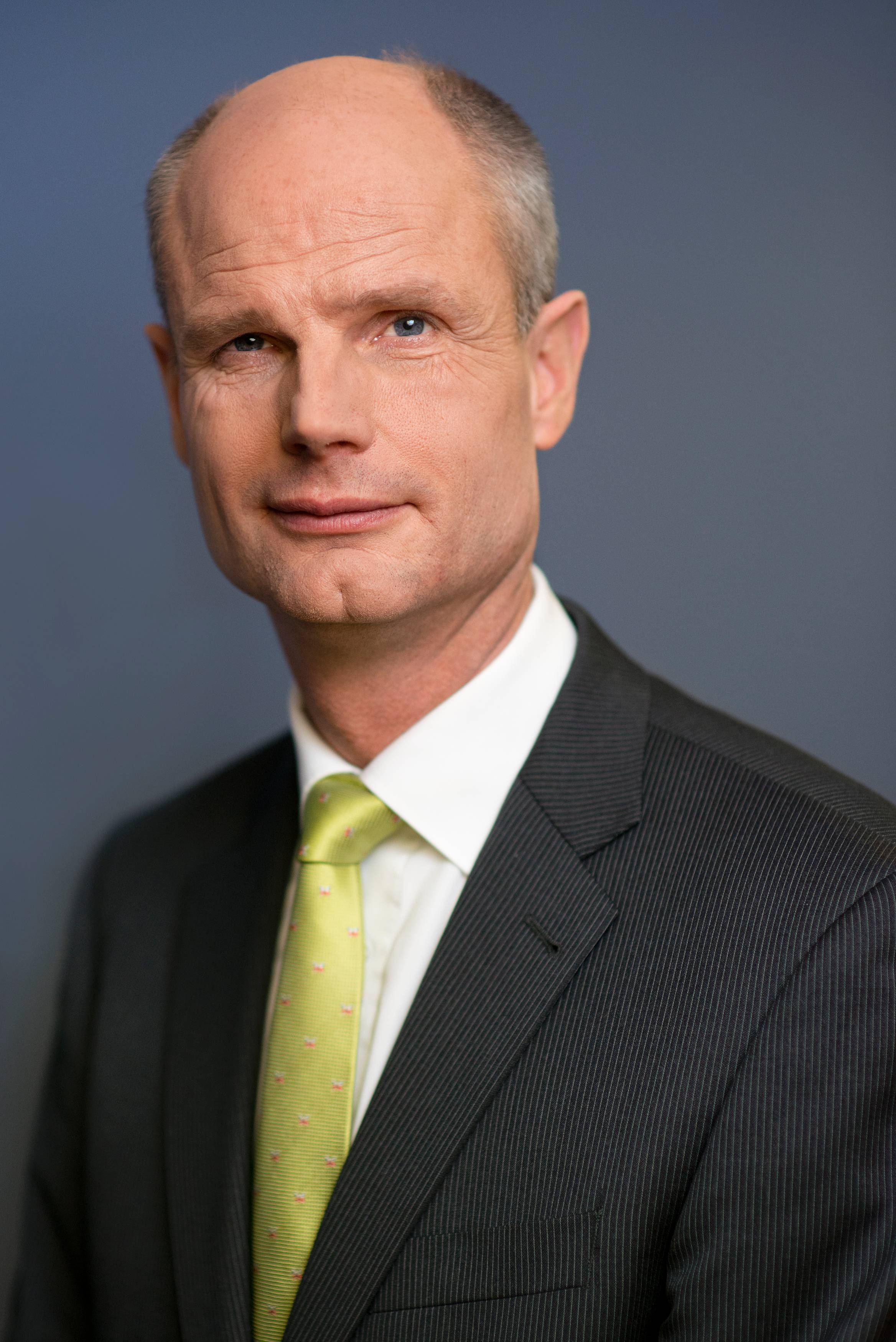 Minister Stef Blok